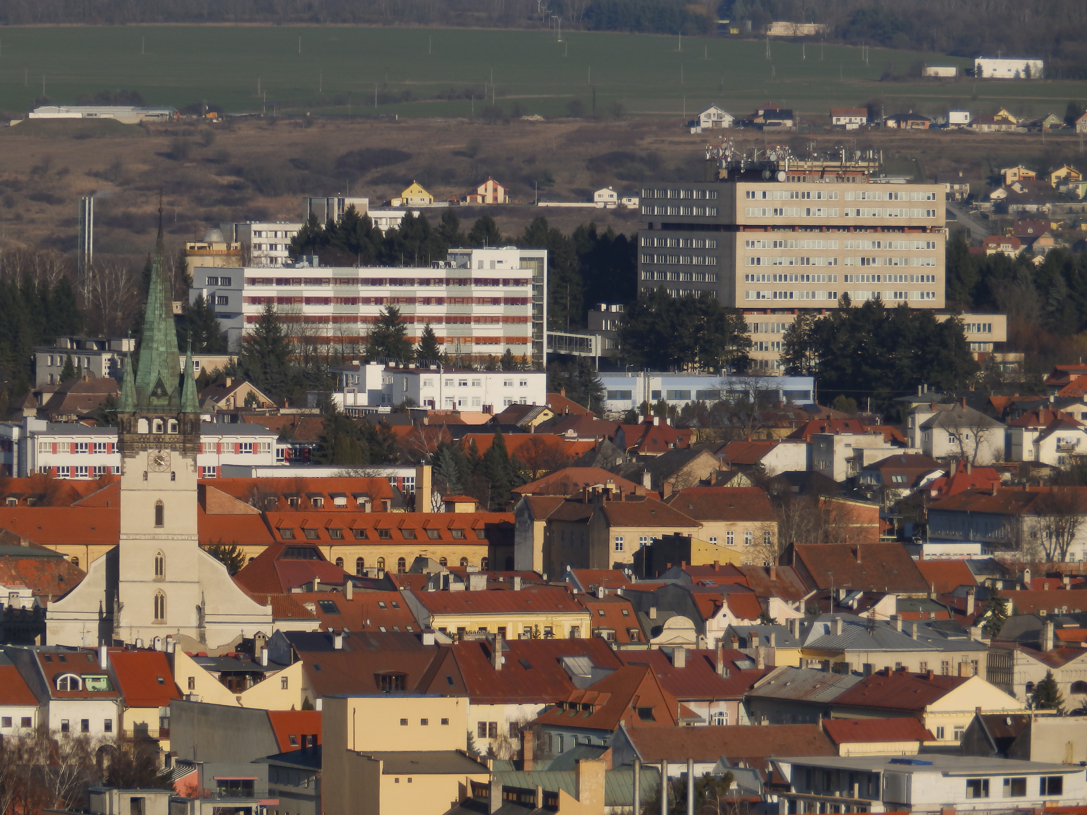 Prešov, Staré mesto